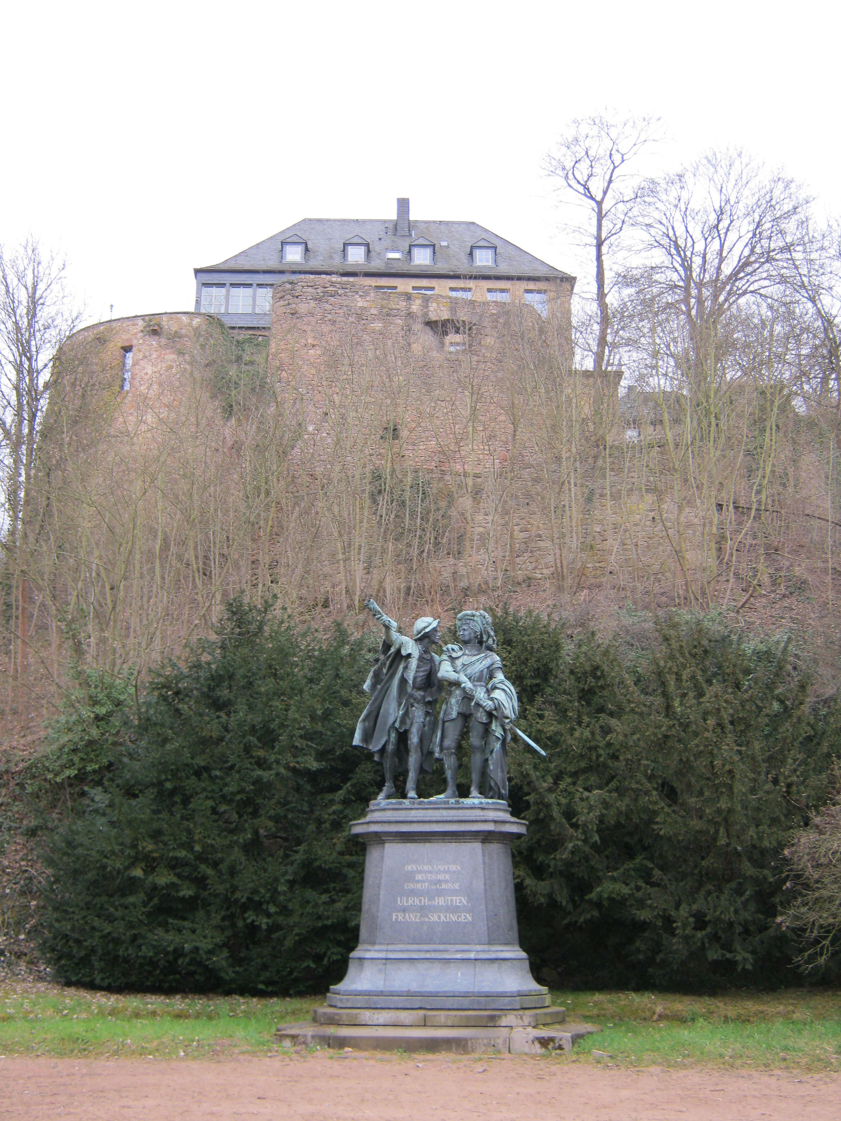 Das Hutten-Sickingen-Denkmal unterhalb der Ebernburg in Bad Kreuznach